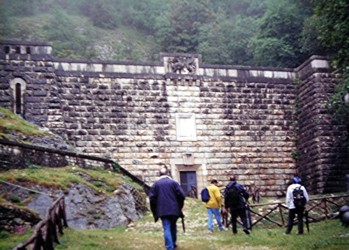 source of Scirca, Villa Scirca, Sigillo, Perugia, Umbria, Italy